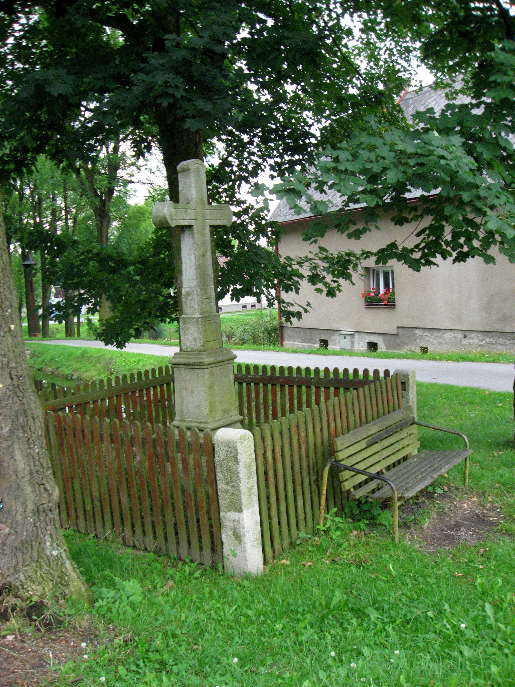 Michalovice, kříž